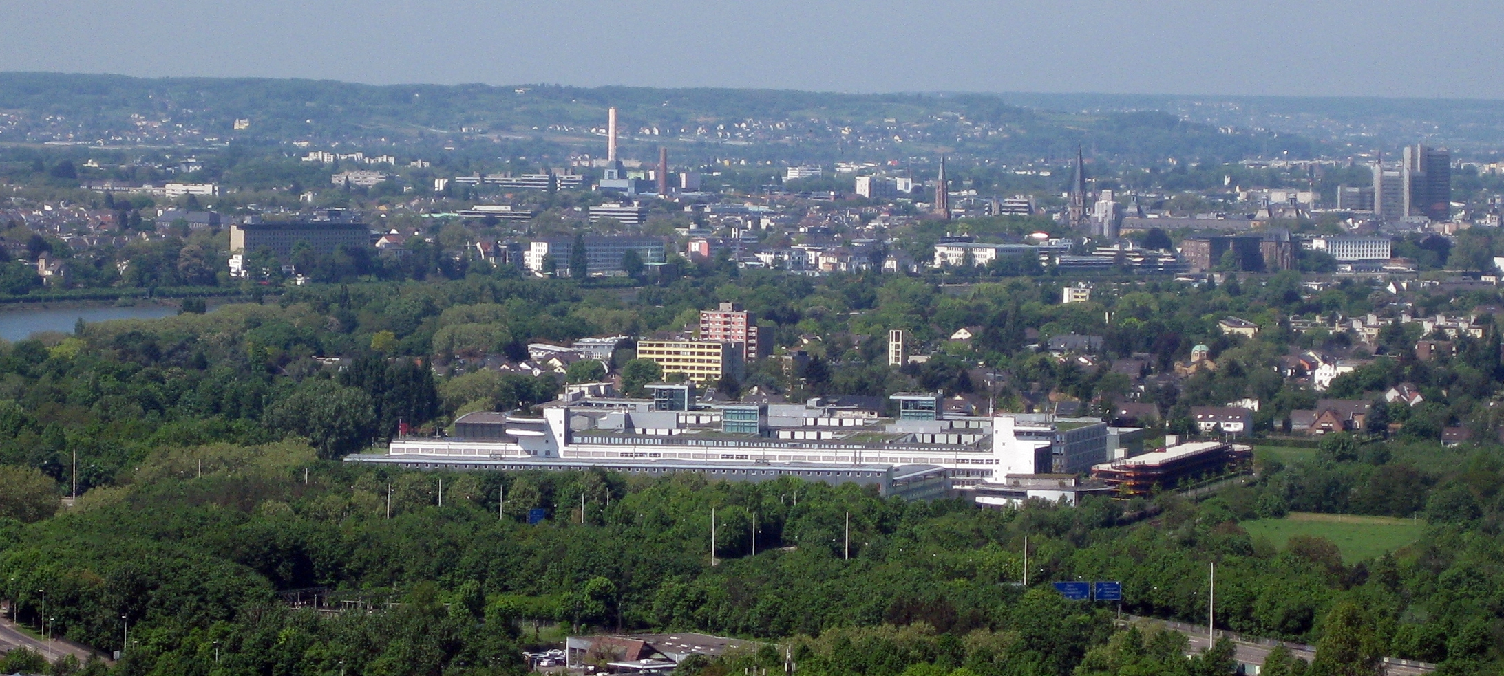 Überblick über den Gebäudekomplex (inkl. Telekom-Shop, Büros, Technik, Konferenzräume, Veranstaltungsfoyer, Kantine, Kinderbetreuung, Fitnessbereich, Tiefgarage, Parkhaus) der Deutschen Telekom/Telekom Deutschland GmbH auf dem Telekom Campus, Landgrabenweg 151, Bonn-Beuel-Limperich; ehemalige Zentrale der vormals eigenständigen Geschäftseinheit Mobilfunk (damalige Firmierungen: Deutsche Telekom Mobilfunk/DeTeMobil/T-Mobil/T-Mobile/T-Mobile International). Die Grenze zwischen den Beueler Ortsteilen Limperich und Ramersdorf verläuft quer über das Grundstück. Die Aufnahme wurde vom Rheinhöhenweg aus gemacht.